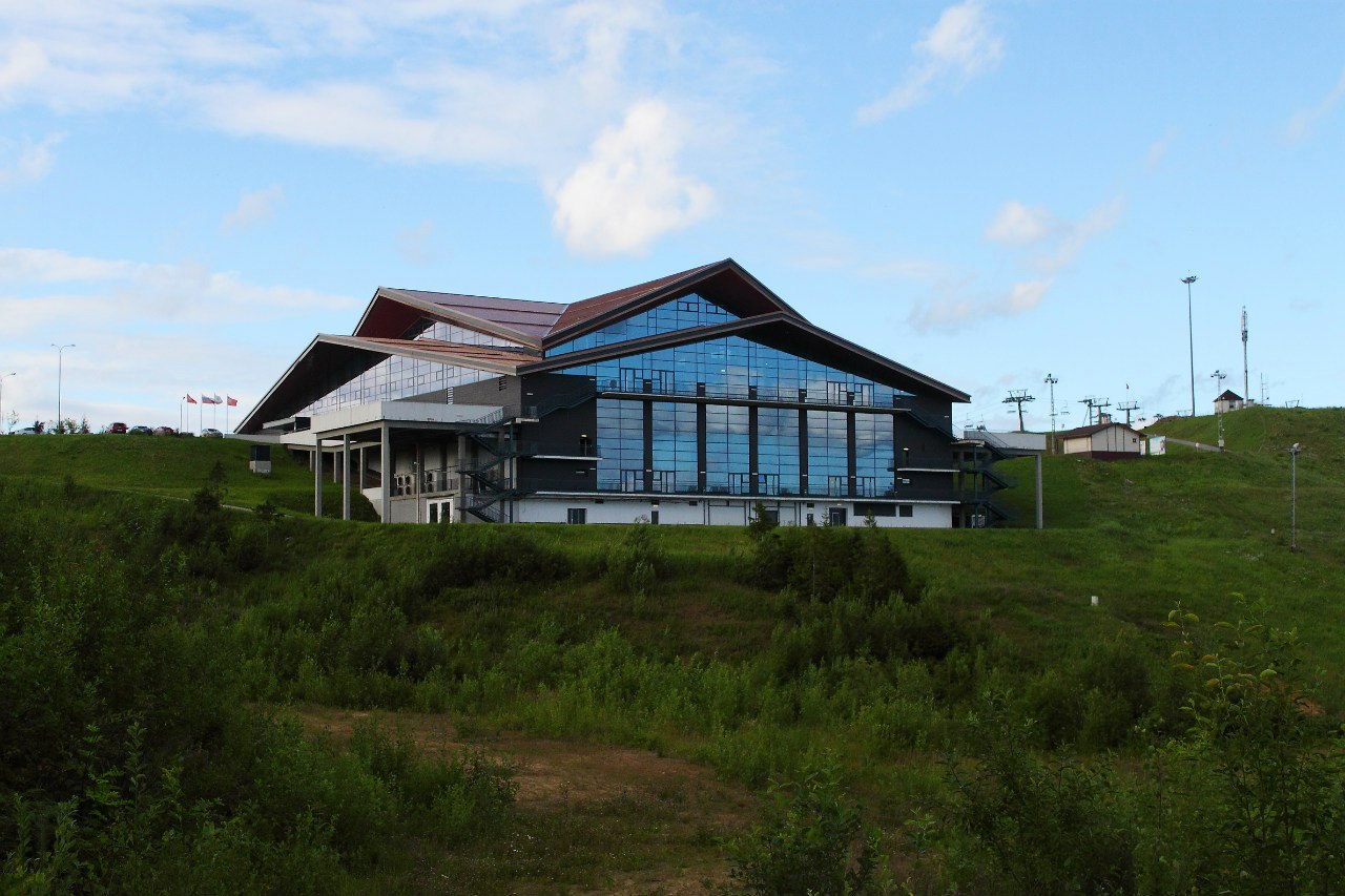 Ледовый дворец в Игоре (Приозерский район)